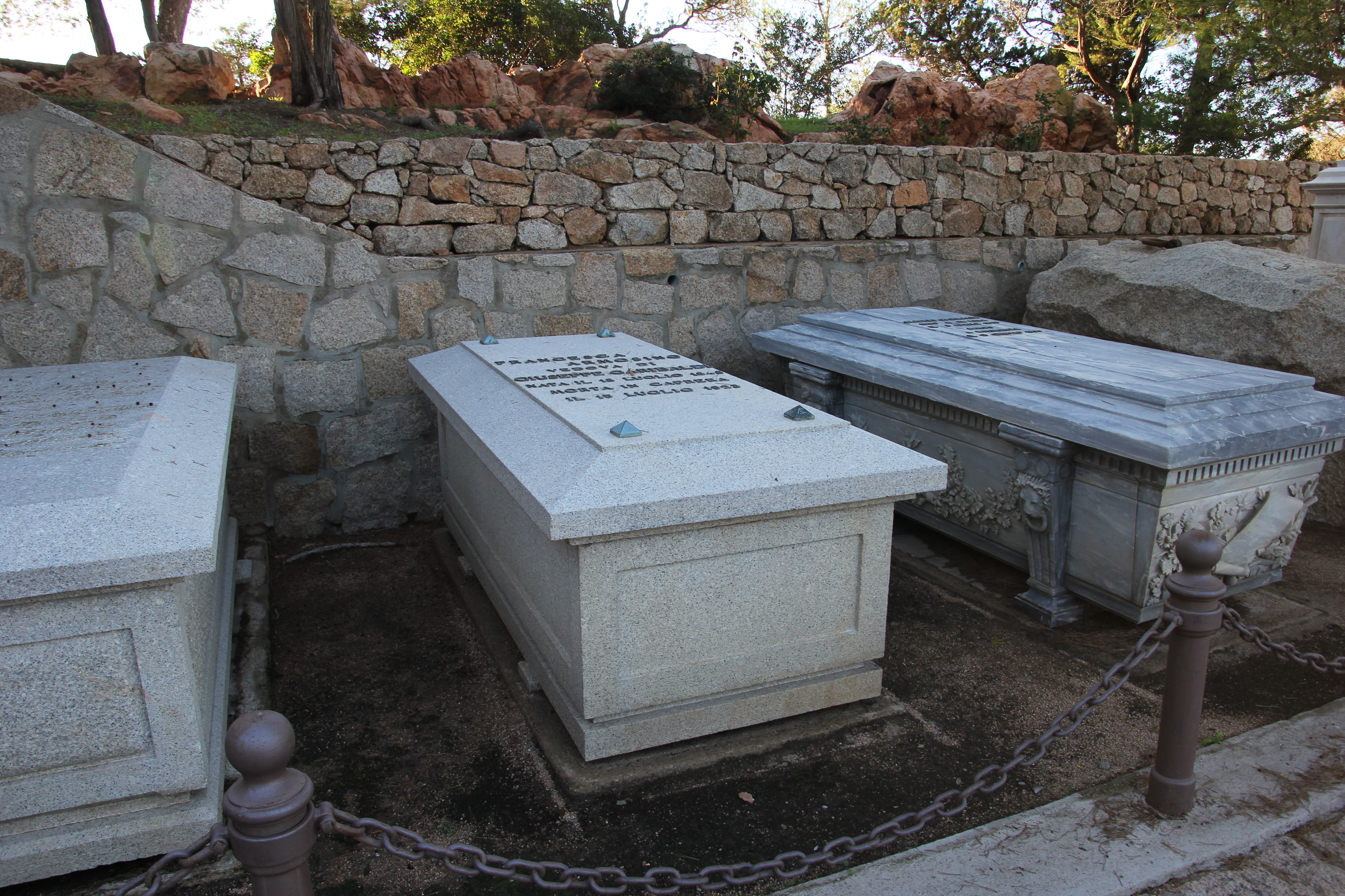 La Maddalena, compendio garibaldino di Caprera - Tomba di Francesca Armosino